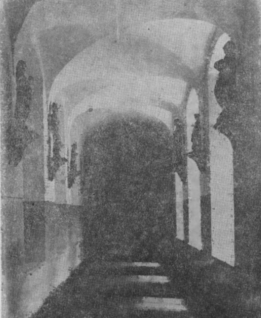 OSW Poznań, 1920 korytarz (później sala kinowa)